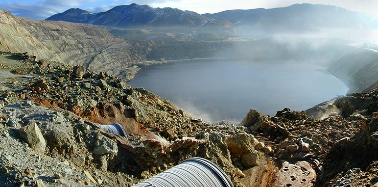 Berkeley Pit